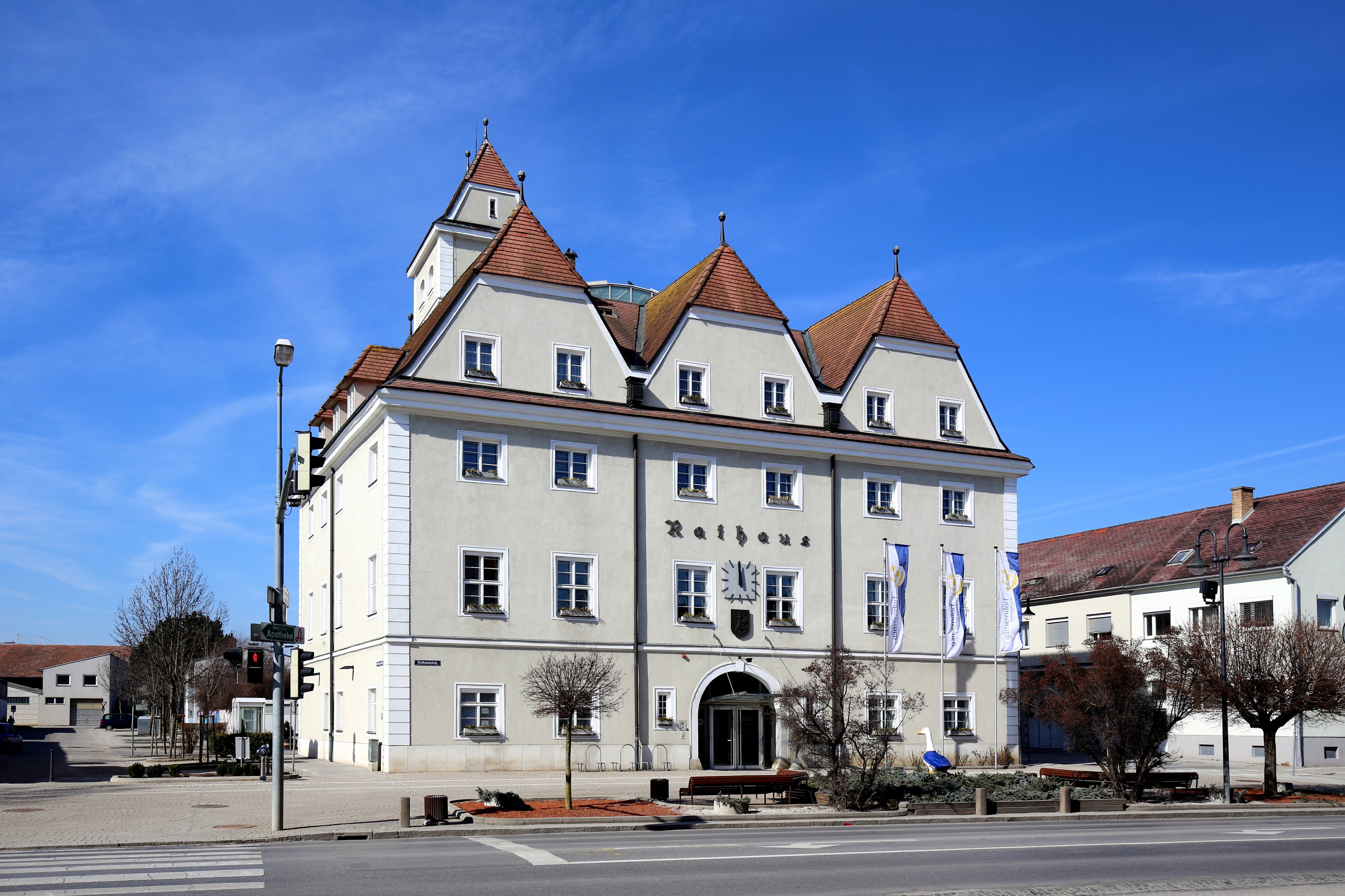 Rathaus und ehemaliges Schloss in der niederösterreichischen Stadt Gänserndorf. Im Kern ein Bau aus dem 16. Jahrhundert, der mehrmaligen Veränderungen erfuhr. Im Jahr 1924 erwarb die Gemeinde das Bauwerk und führte 1925 einen historisierenden Wiederaufbau des stark veränderten Baues nach einer Stichvorlage von Vischer durch.